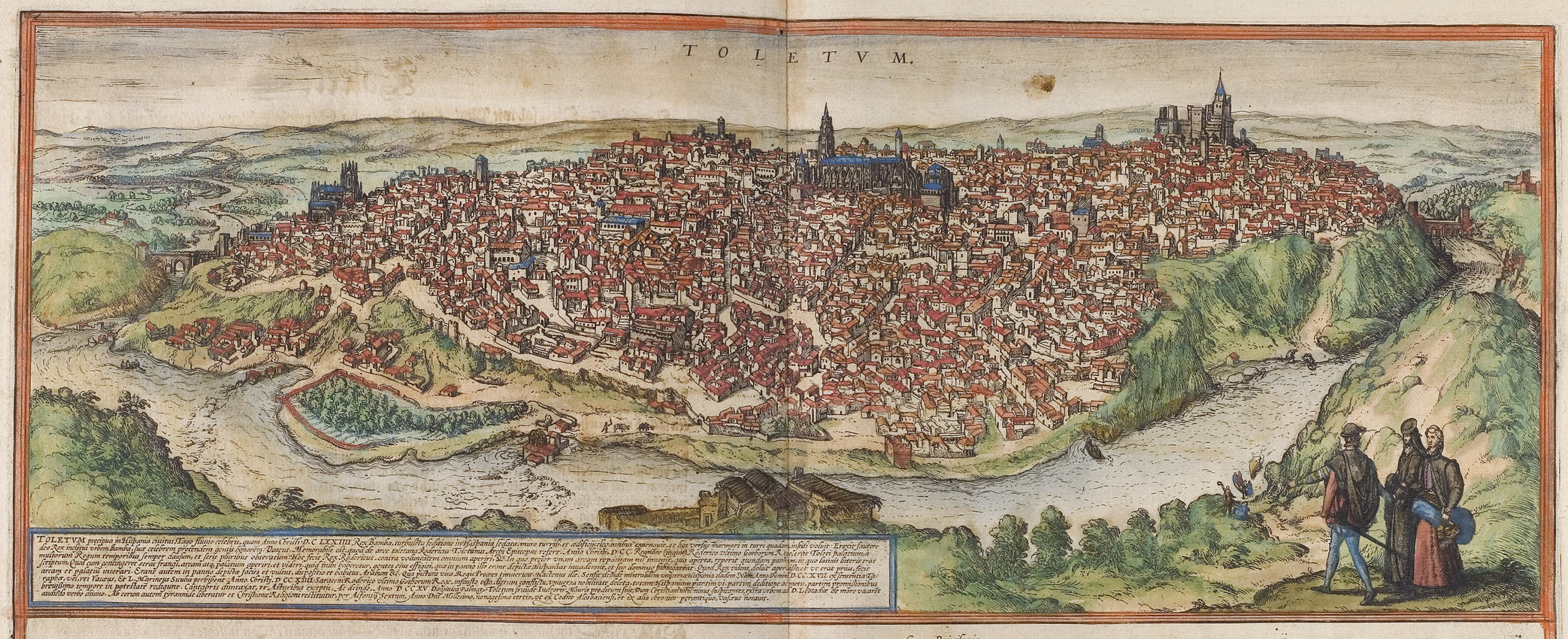 Toledo